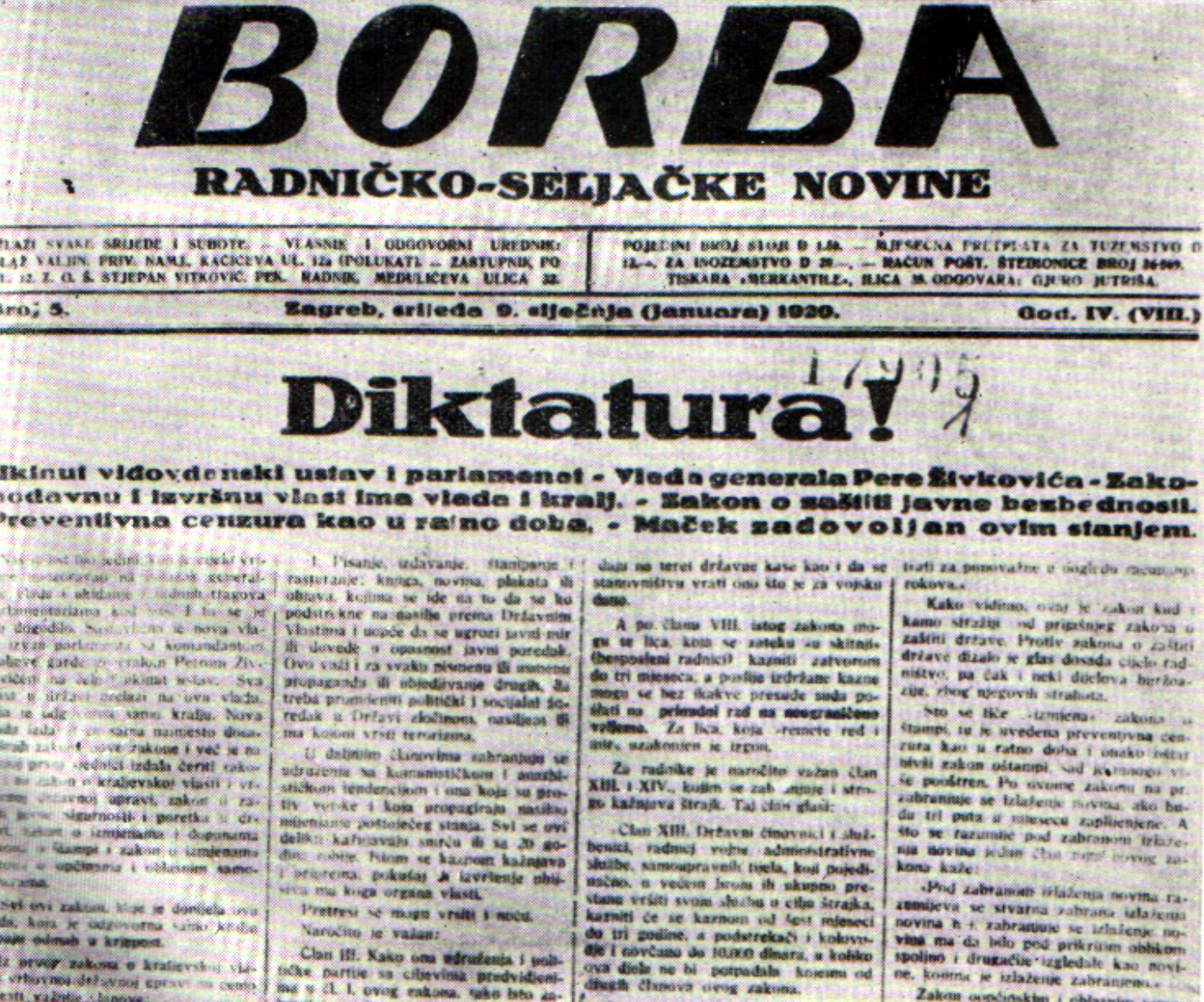 Srpskohrvatski / српскохрватски: Naslovnica Borbe protiv proglašenja Šestojanuarske diktature.